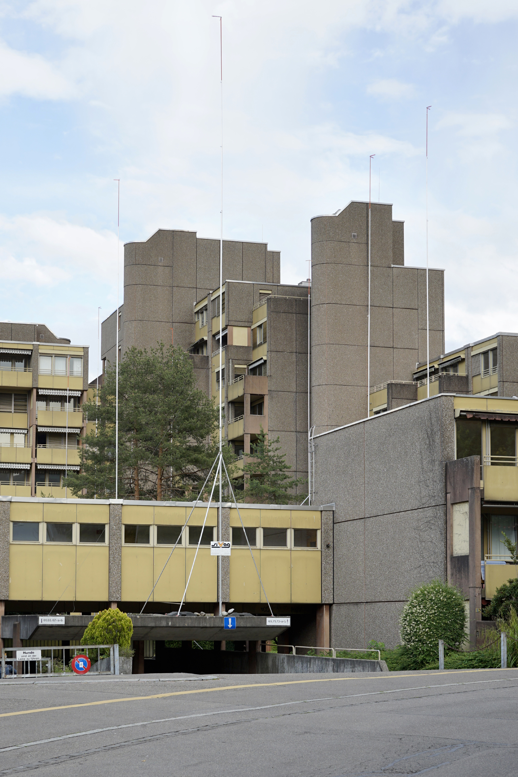 Siedlung Wydäckerring, Zürich, 1973, Kuhn + Stahel Architekten